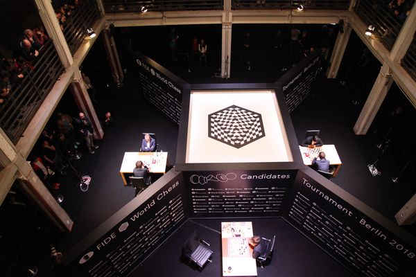 Турнирный зал, Турнир Претендентов 2018